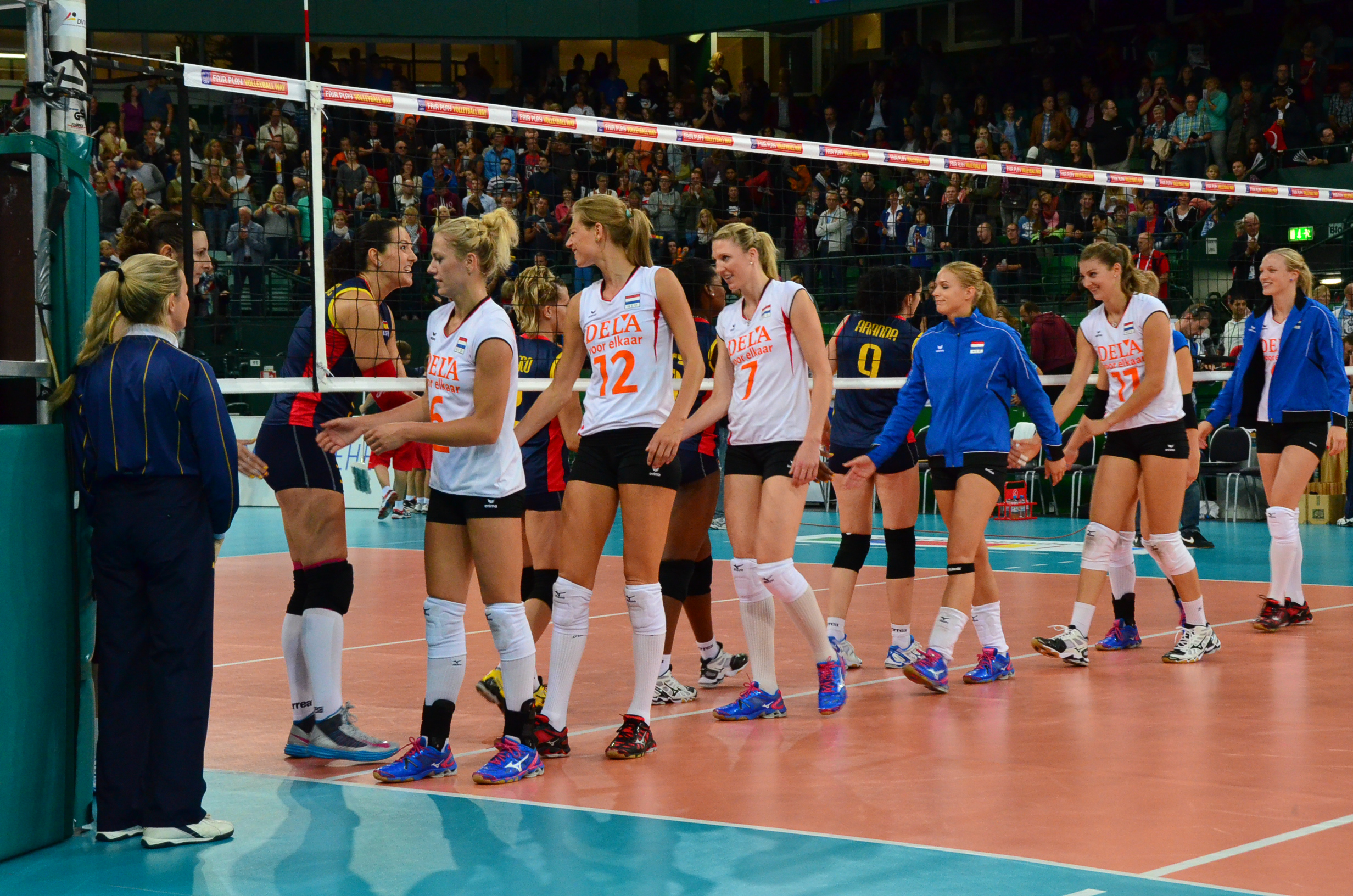 Volleyball-Europameisterschaft der Frauen 2013-Spielort Halle (Westf) Gerry-Weber-Stadion - Spiel 8. September 2013 (Spanien-Niederlande)